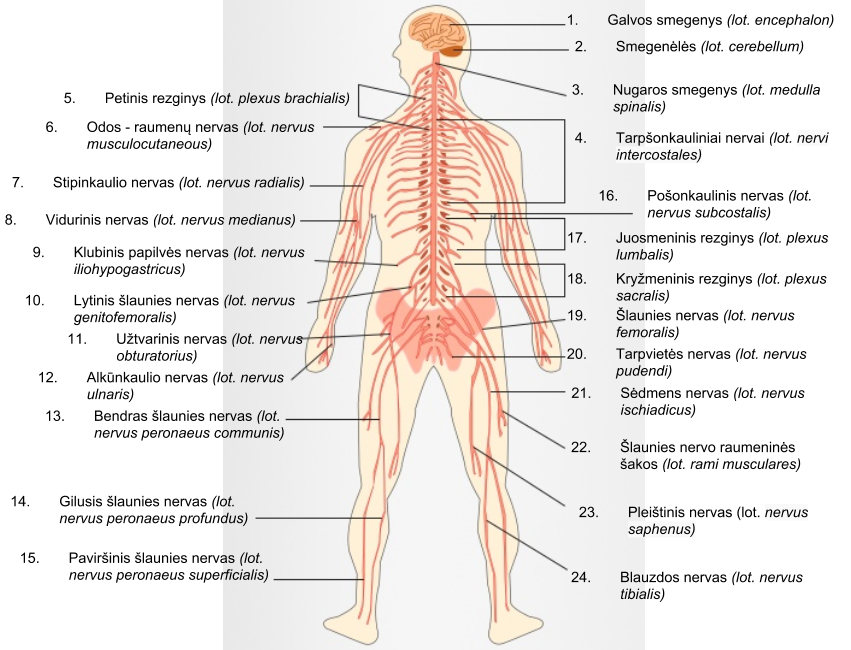 Nervous system